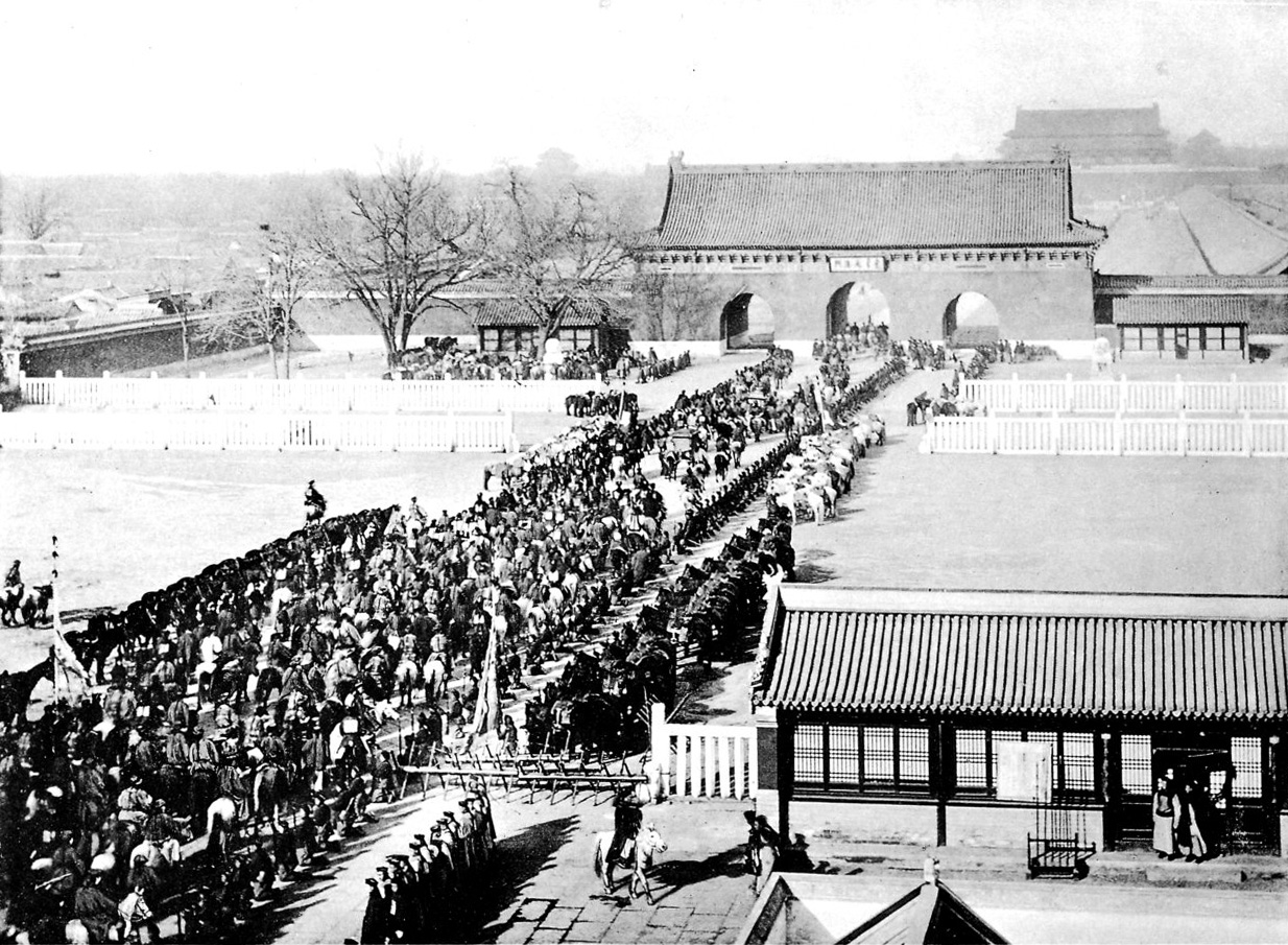 photo from Ein Tagebuch in Bildern